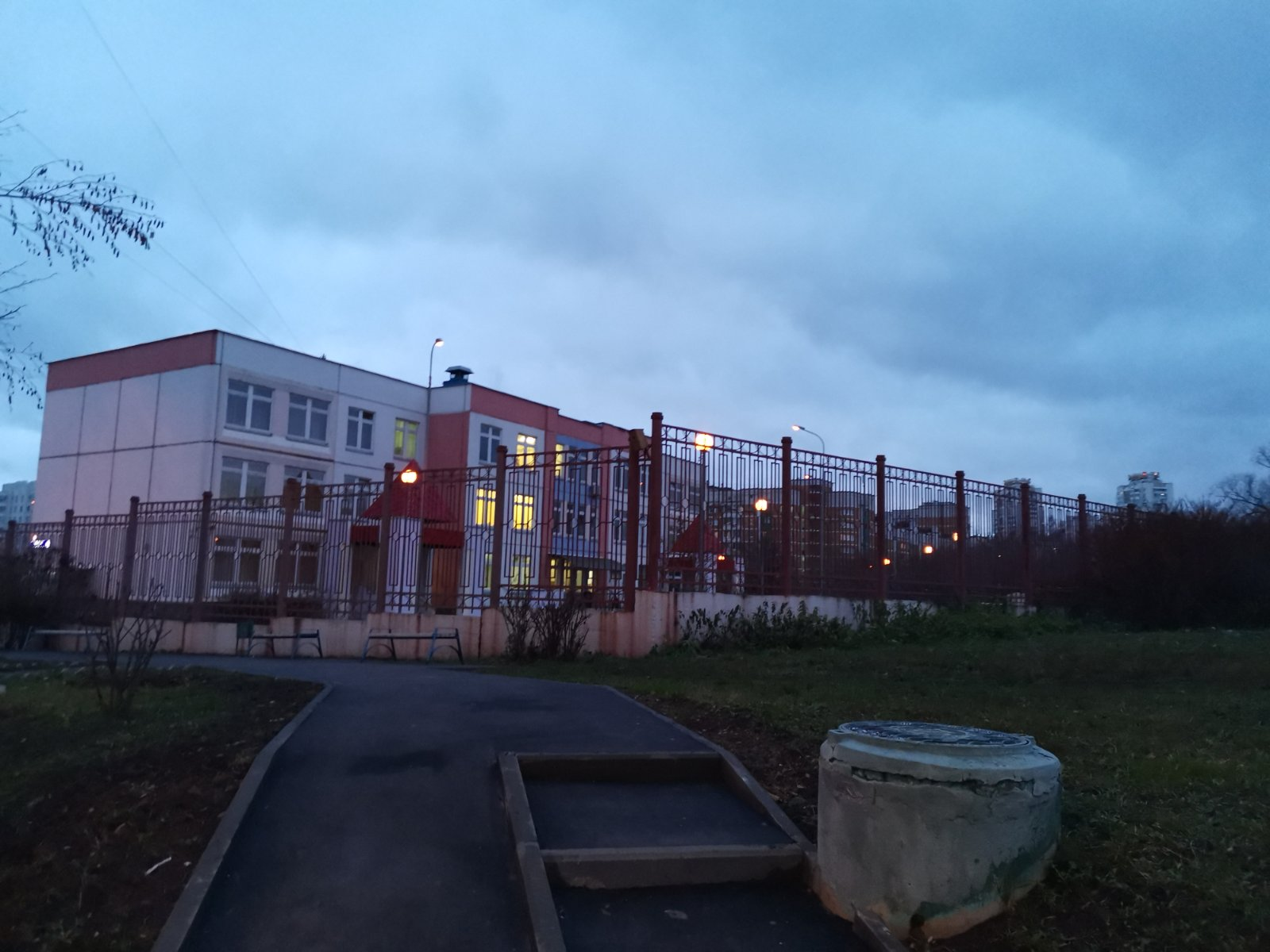 Детский сад,учреждение